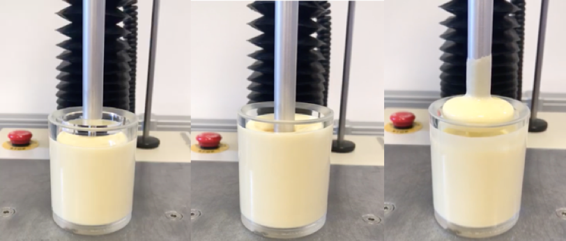 texturometro